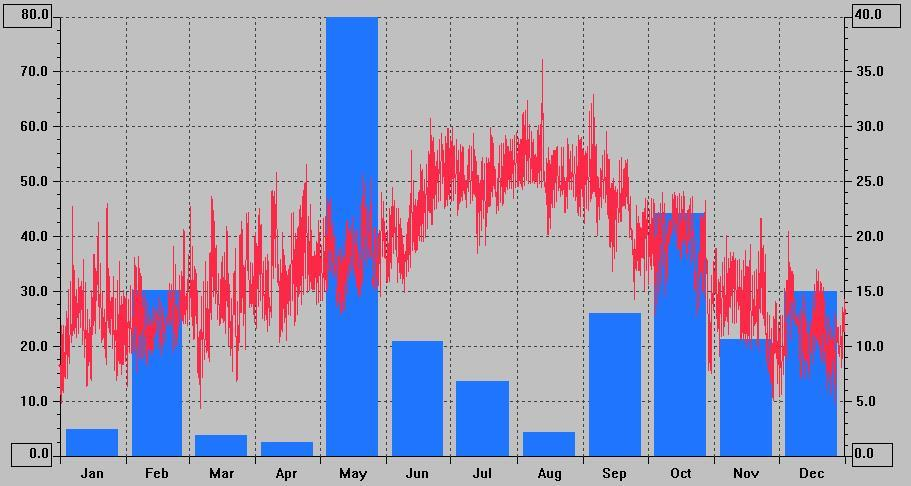 Estación meteorológica en Castellón: Lluvias del año 2008